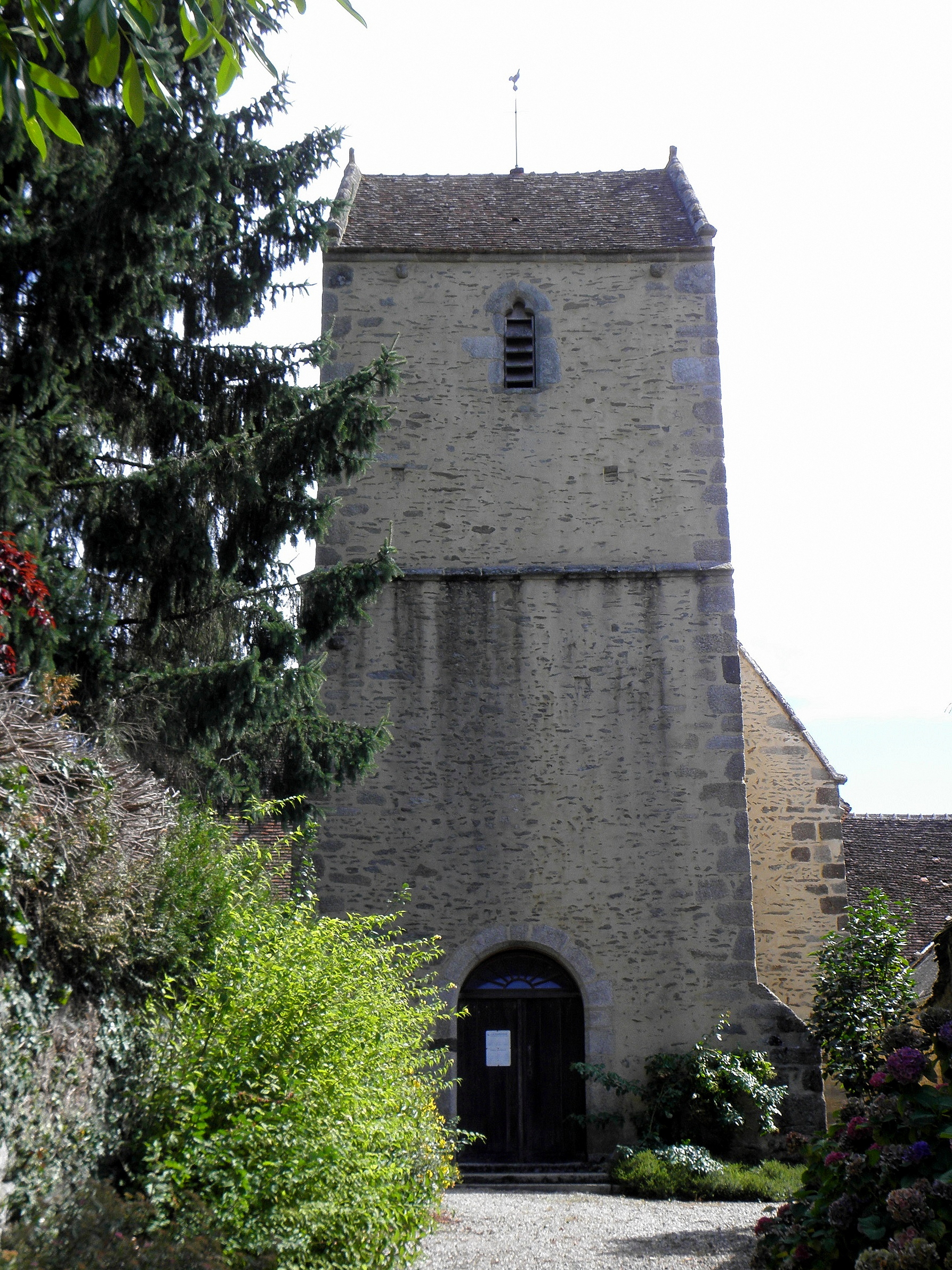 Église Saint-Pierre de Pacé (61). Façade occidentale.